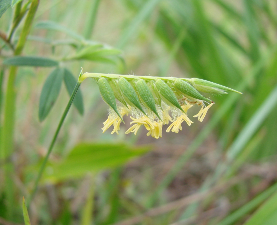 Echinolaena inflexa - POACEAE Parque Estadual da Serra dos Pirineus - Pirenópolis - Goiás - Brasil